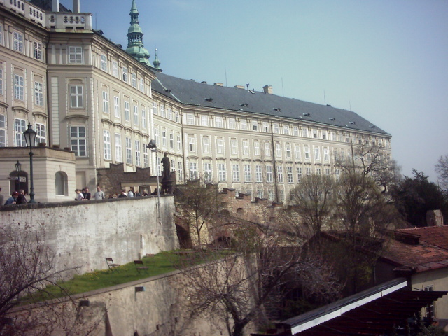 Pražský hrad, Nový královský palác a vstup do Rajské zahrady